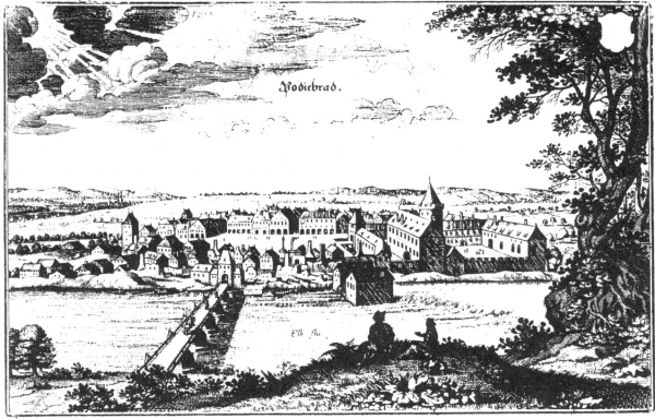 Poděbrady v roce 1650 z Merianova díla Topografphia. Obraz však obsahuje některé nepřesnosti – například na jižní straně zámku nebyla holá zeď, nýbrž stavba a taktéž kopcovité okolí města je smyšlené.